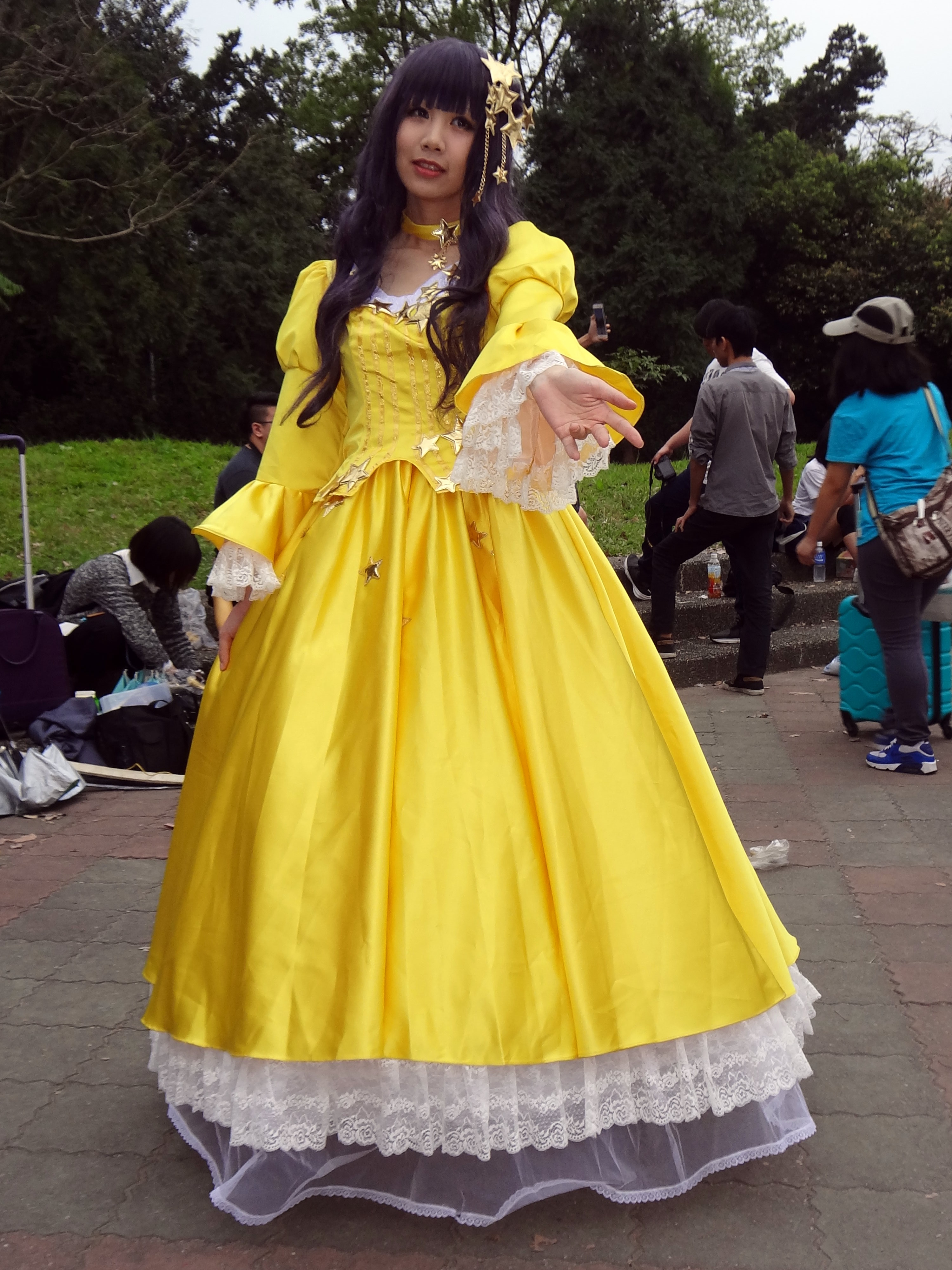 第48屆台灣同人誌販售會，《庫洛魔法使》大道寺知世cosplayer。